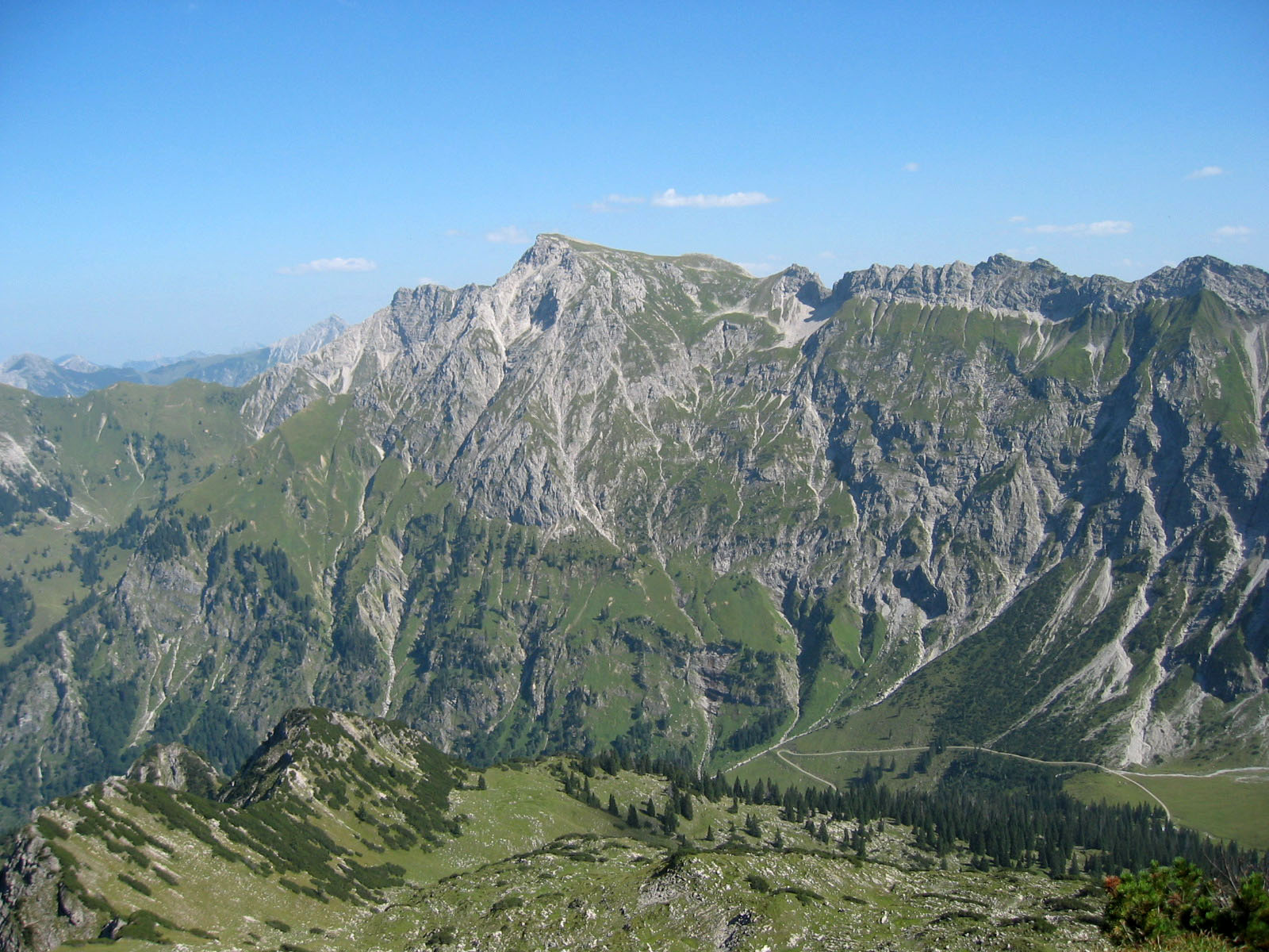 Großer Daumen (2280 m) in den Allgäuer Alpen, vom Entschenkopf (2043 m) aufgenommen.